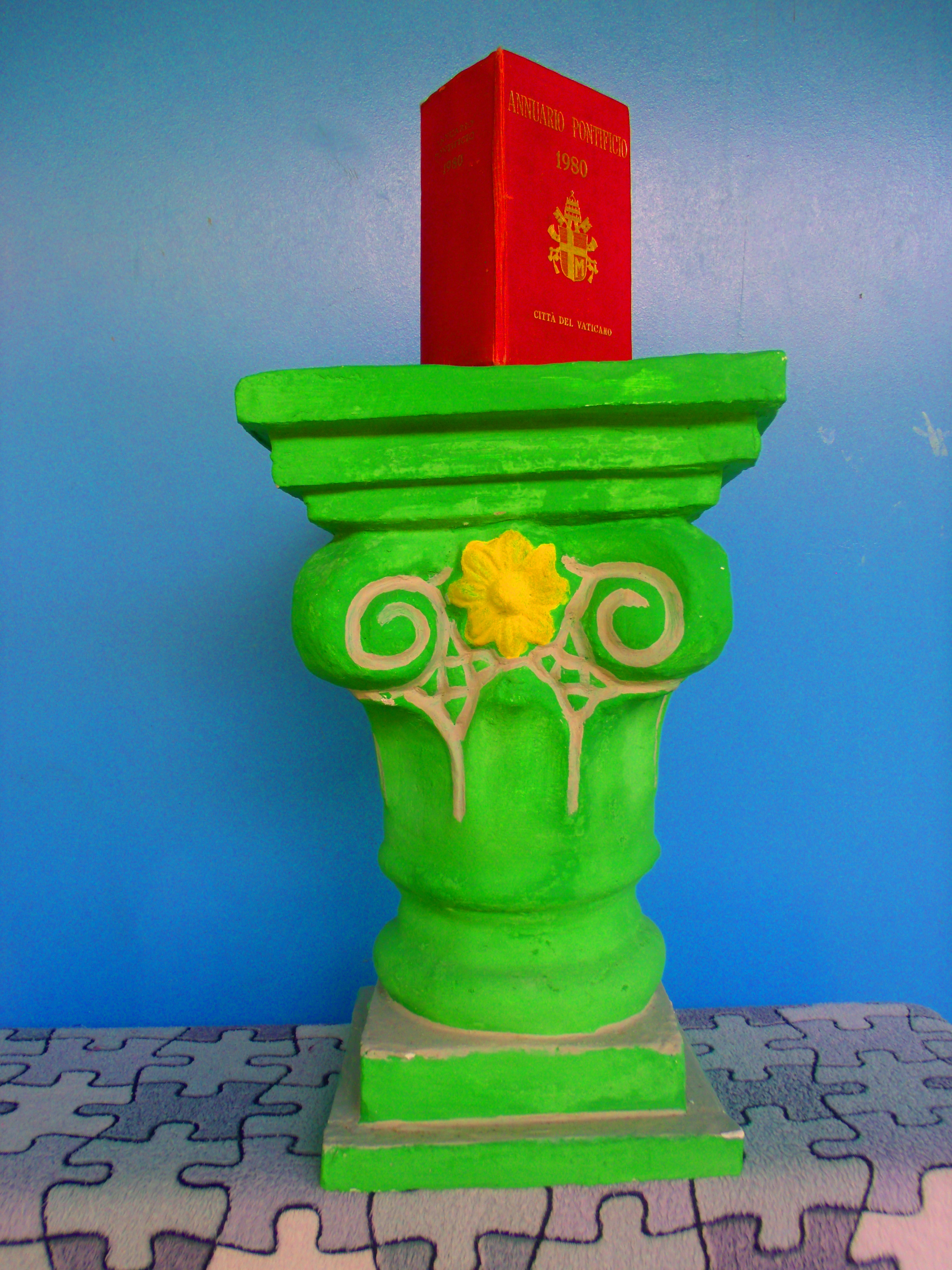 Coluna vintage com o Annuario Pontificio de 1980.